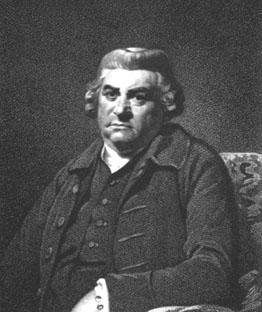 توماس وارتون.